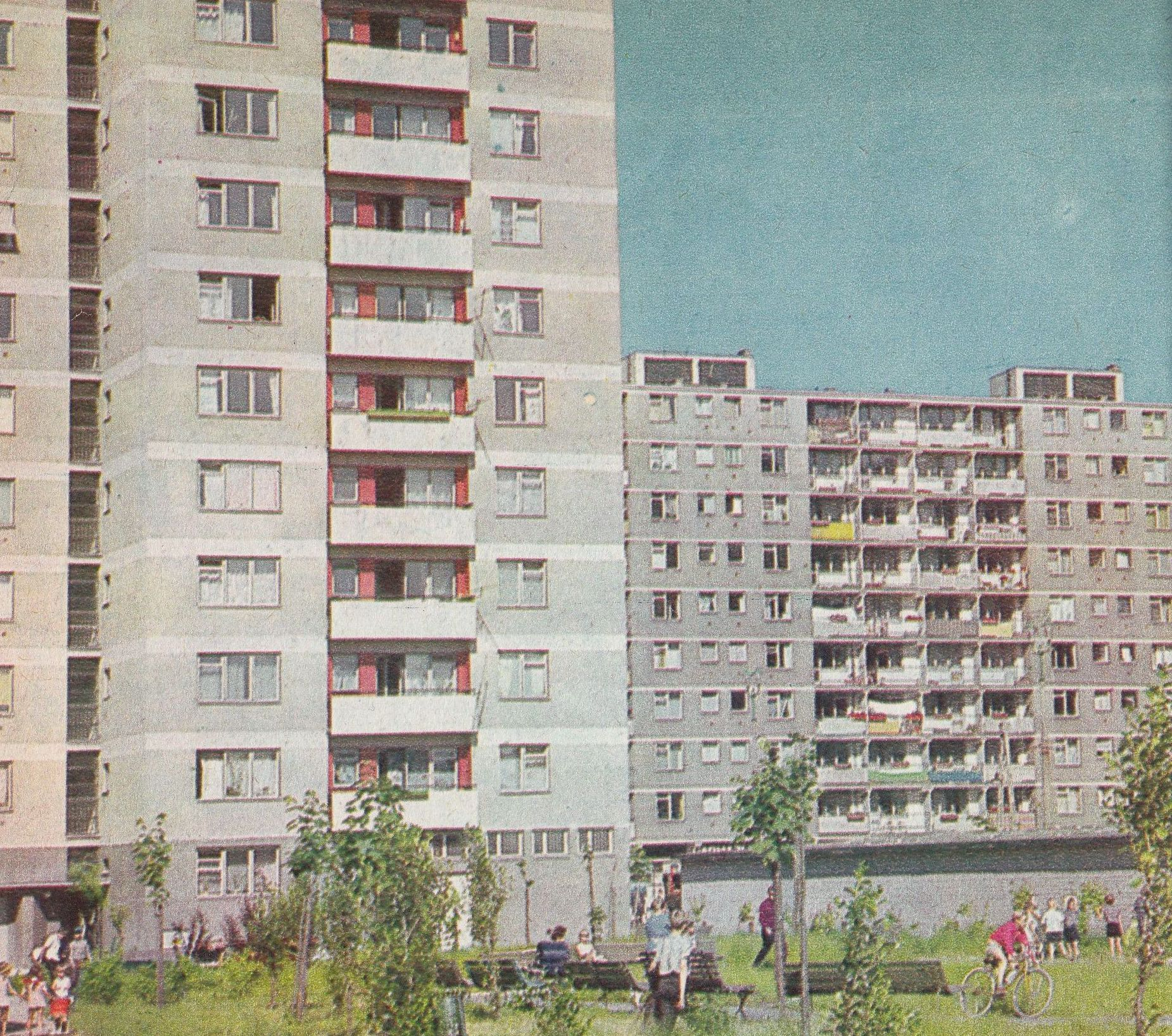 Osiedle Muranów Pólnocny w Warszawie. Budynki o szkielecie z elementów prefabrykowanych tzw. ramy H